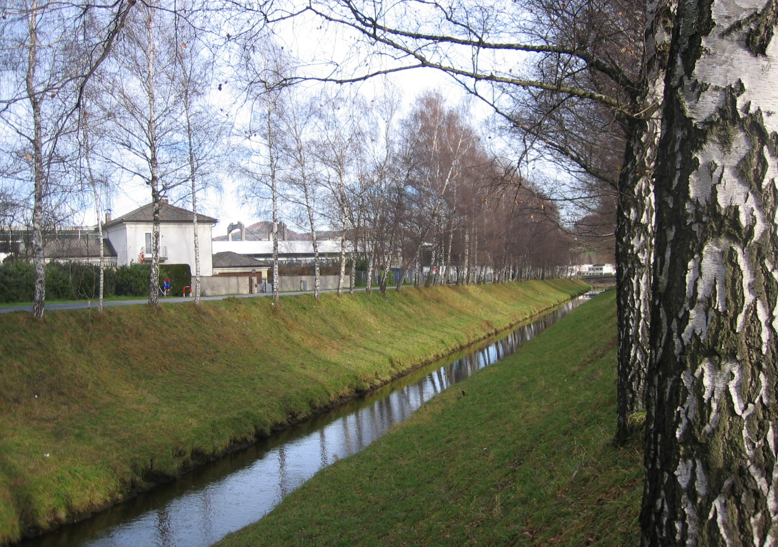 Glan, Ausstellungszentrum Salzburg Photograph by Gakuro